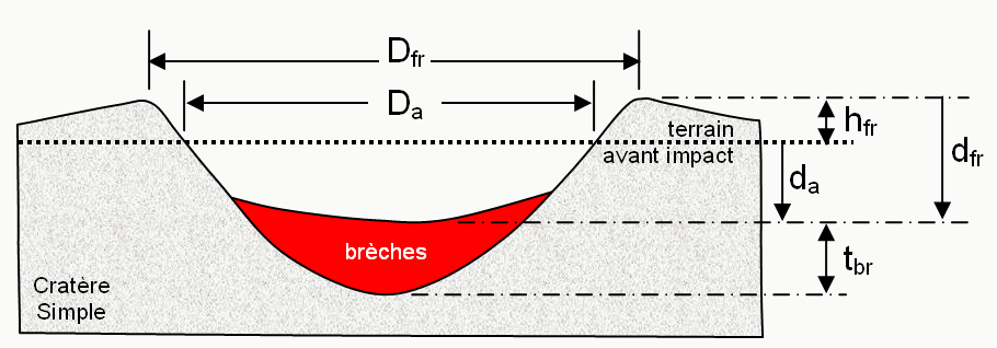 Dfr = diamètre crète à crète Da = diamètre apparent dfr = profondeur crète - fond da = profondeur apparente hfr = hauteur des crètes tbr = épaisseur des brèches Pour lire cette image, voir la page Cratère météoritique